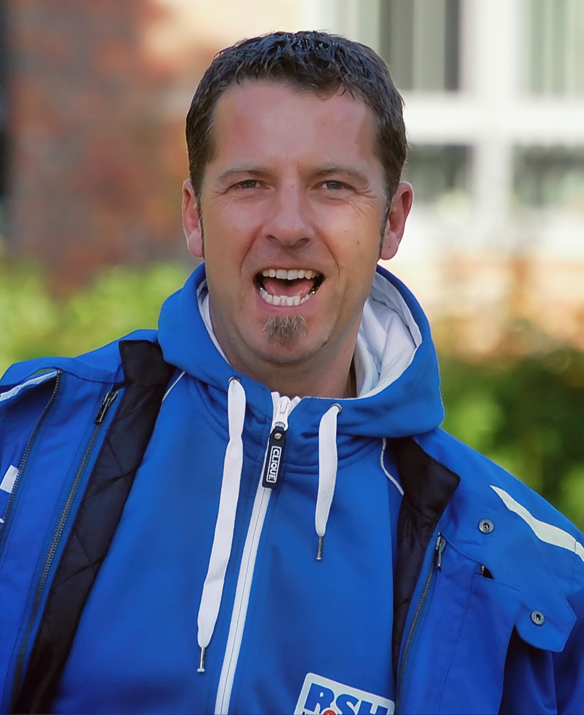 Volker „Voller“ Mittmann, German radio moderator and disk jockey